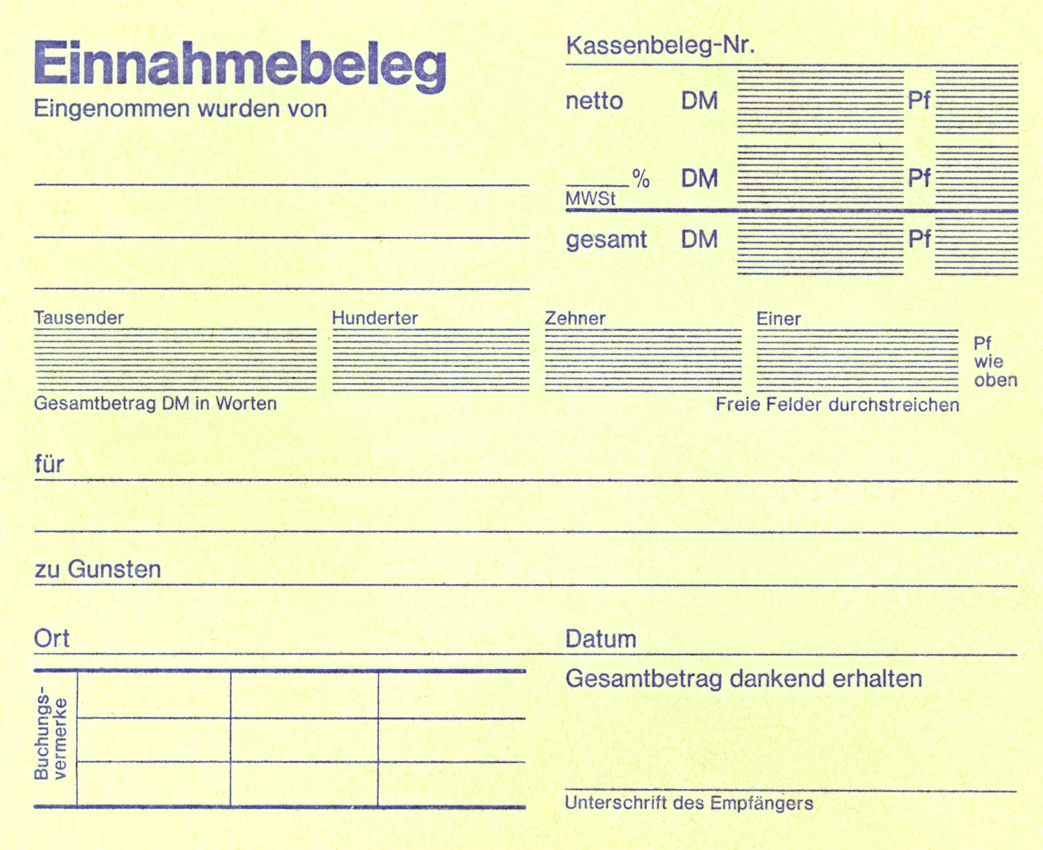 Buchführung, Einnahmebeleg, Mitte der 1980er Jahre über DM und Pfennige, DIN A5, ca. Abmessung ca. 130x105 mm